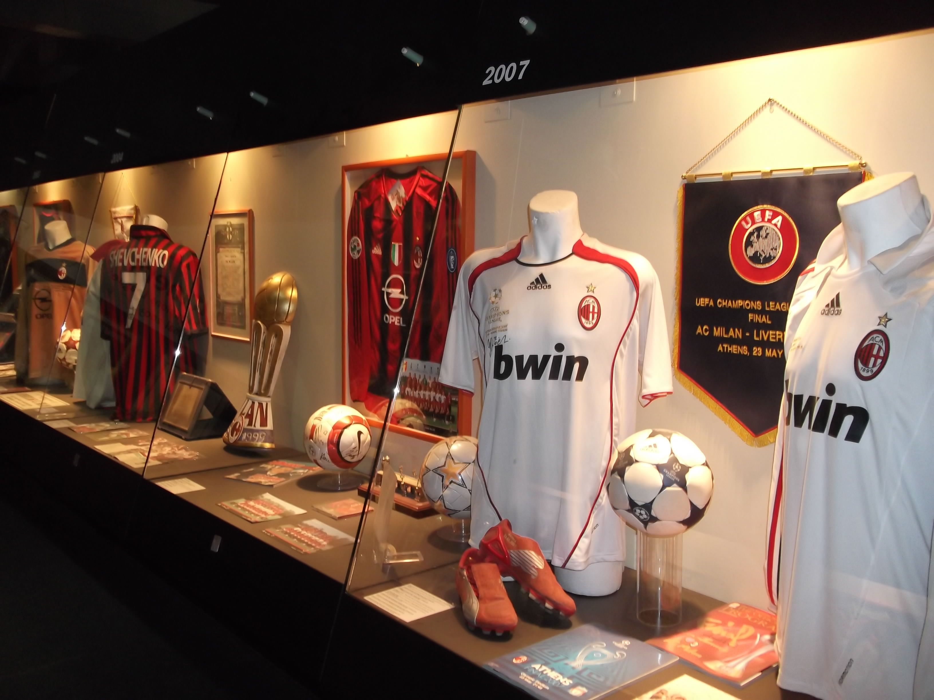 San Siro